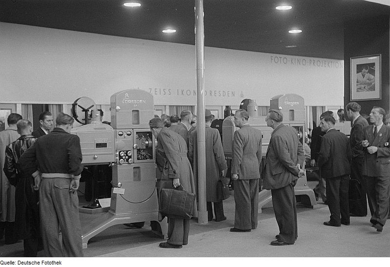 Original image description from the Deutsche FotothekBesucher an dem Messestand des VEB Zeiss Ikon Dresden in der Ausstellung "Foto Kino Projektion"